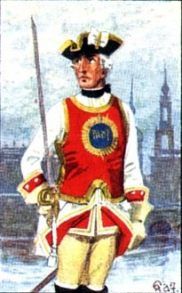 Sächsische Generalität und Infanterie; Trabant in Gala von der Garde du Corps, ihre Uniform wurde das Vorbild der 1740 errichteten preußischen Garde du Corps